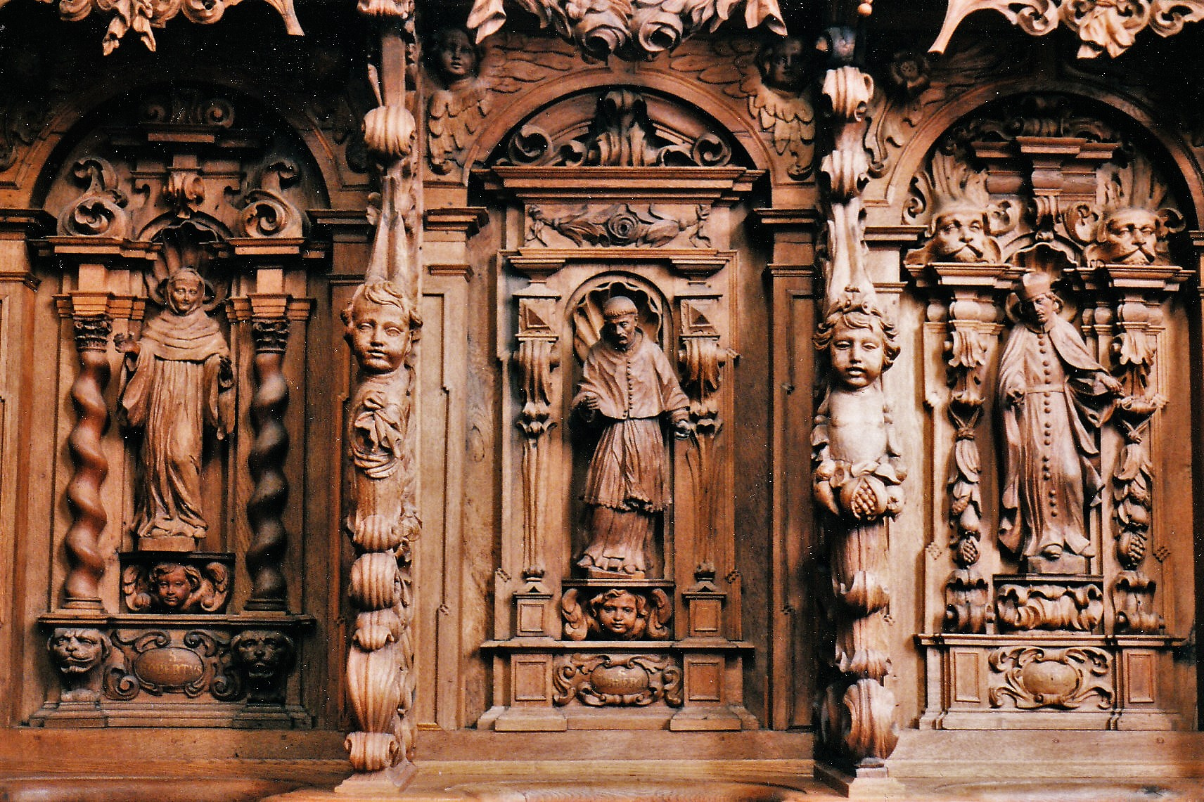 St. Maria (Buxheim): Chorgestühl von 1691, Nordseite